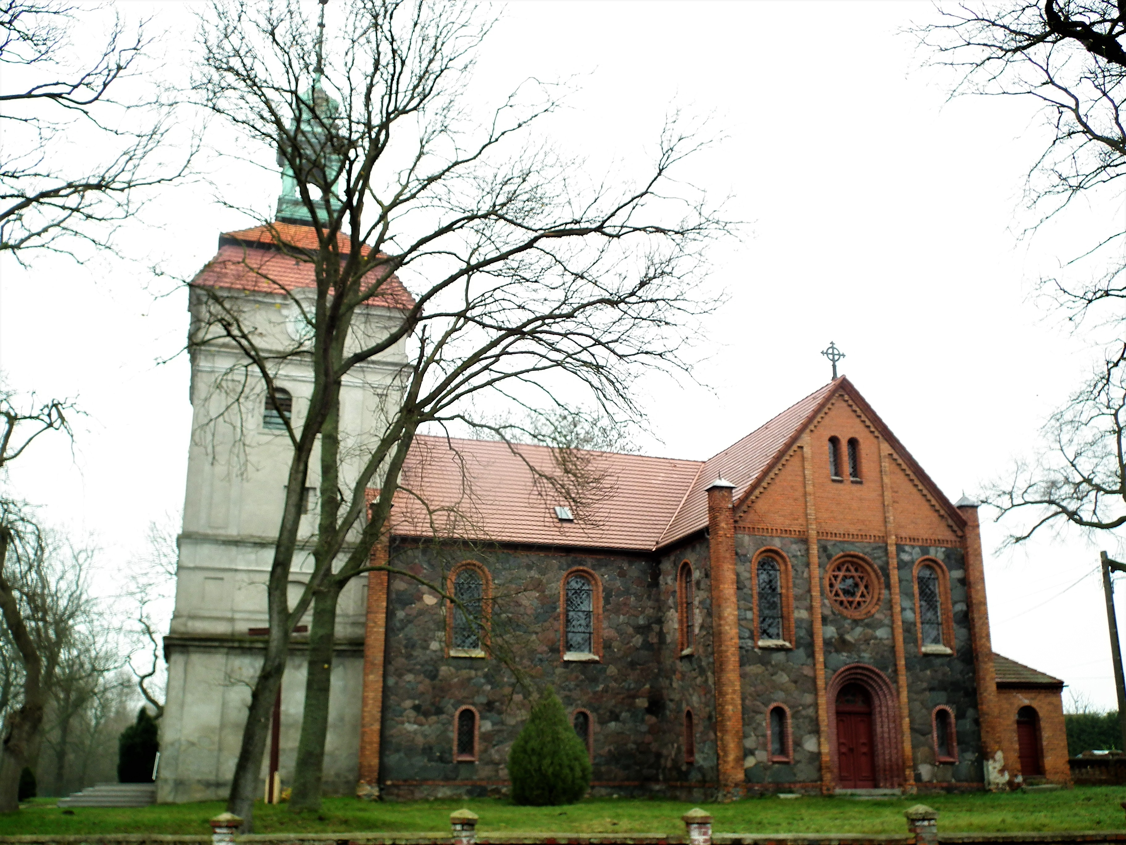 Kościół św. Wojciecha Biskupa w Mościcach koło Witnicy.